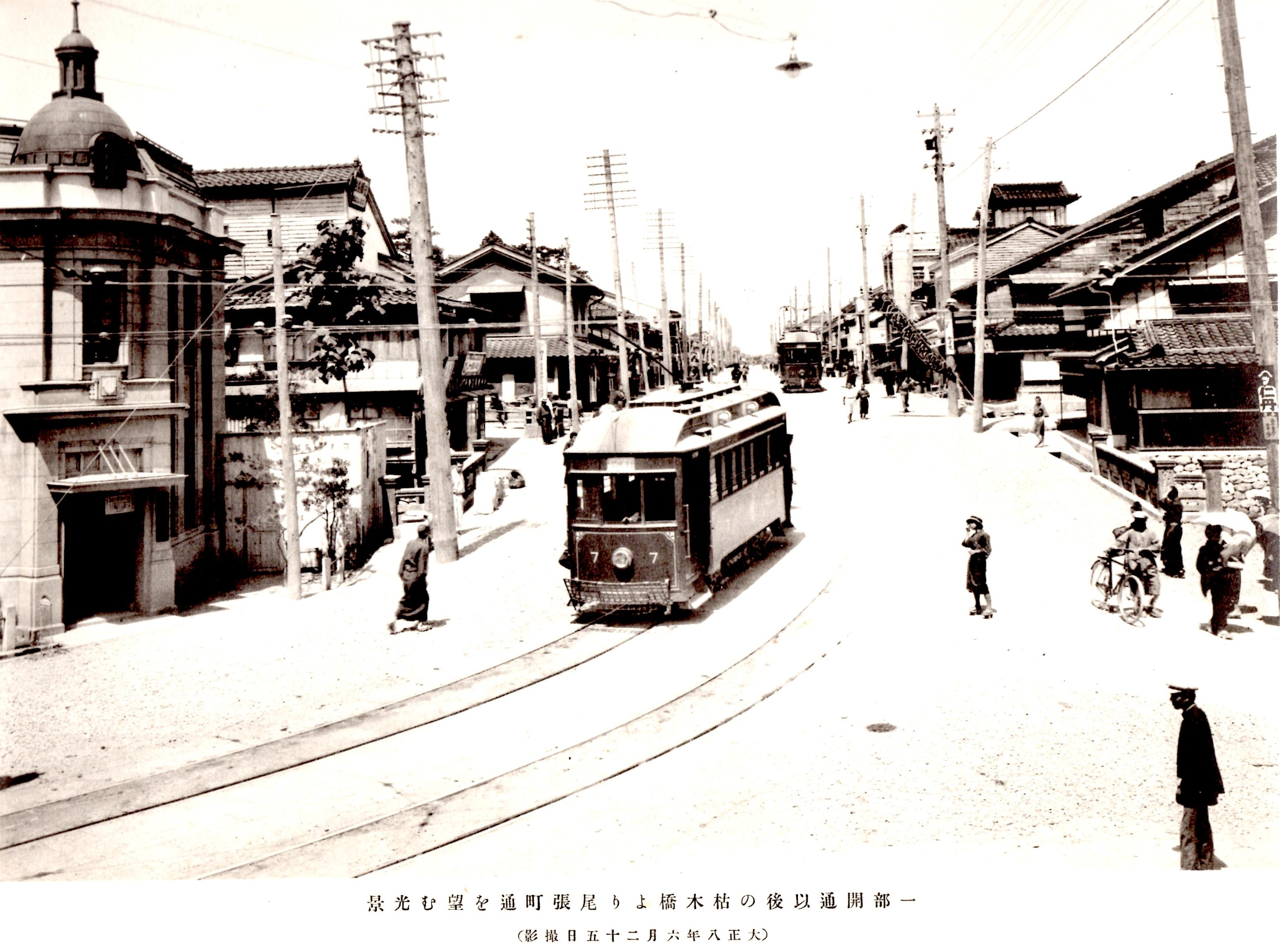 原題は「一部開通以後の枯木橋より尾張町通を望む光景」